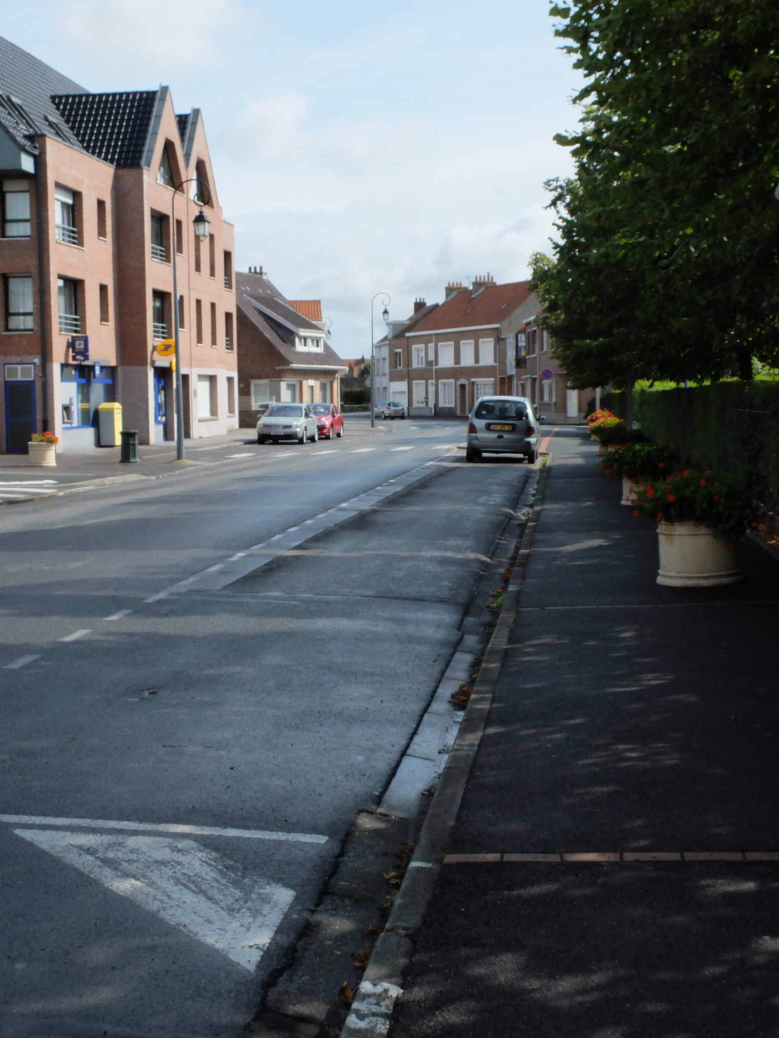 Vue de la rue de la mairie de Téteghem.